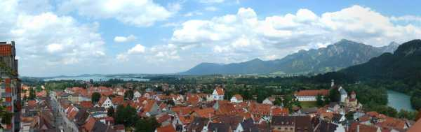 Blick über Füssen - Panoramabild